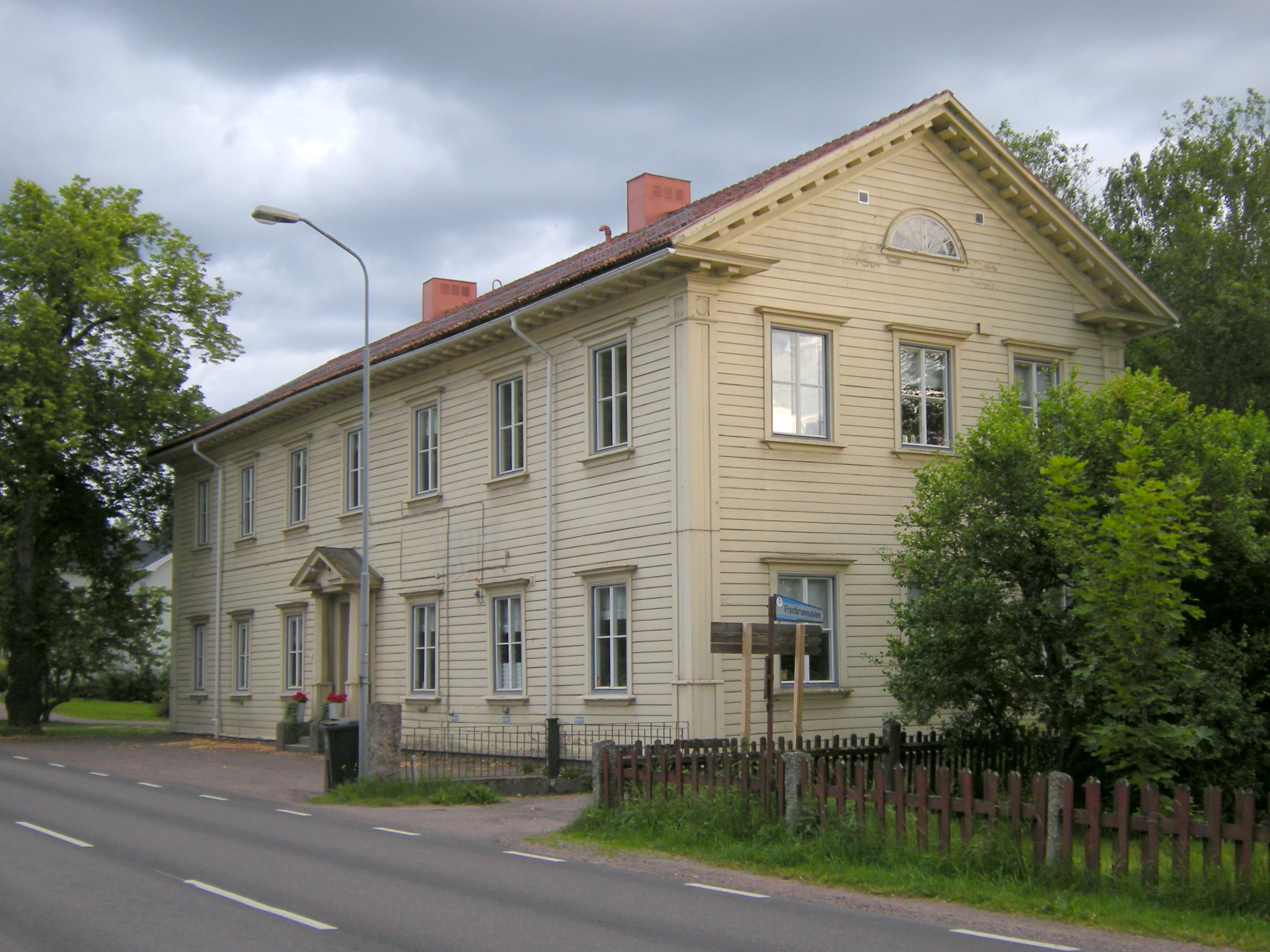 Stora Tuna kommunalhus i Romme.